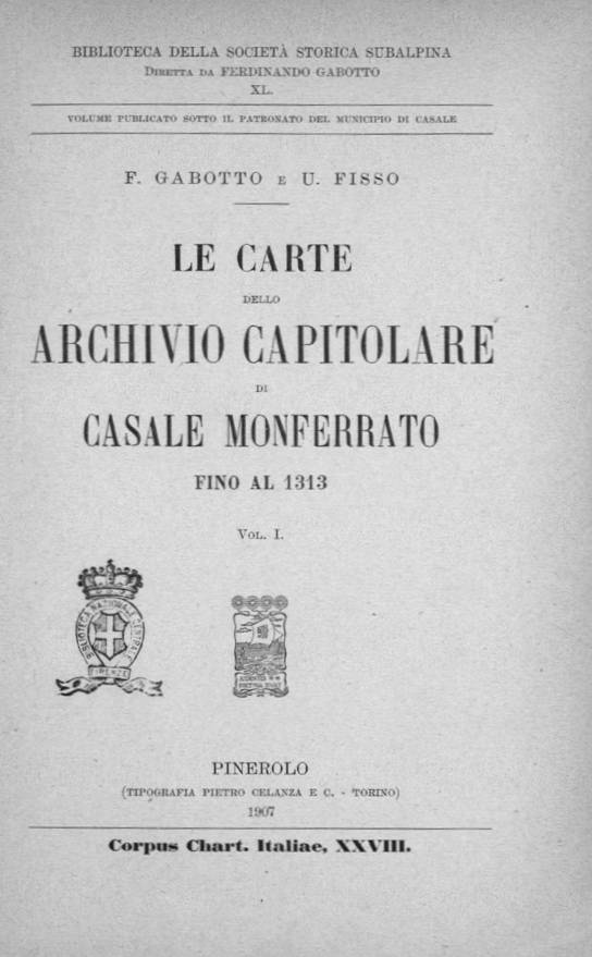 Frontespizio